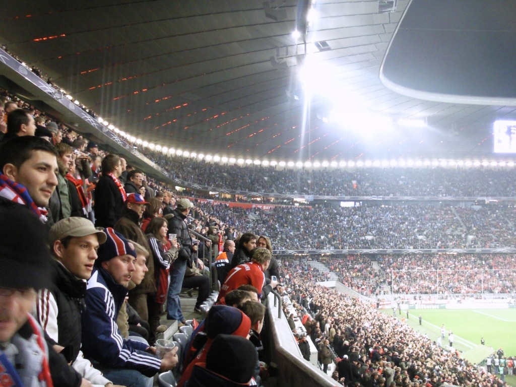 DFB Pokal Viertelfinale 2008: FC Bayern : 1860 München